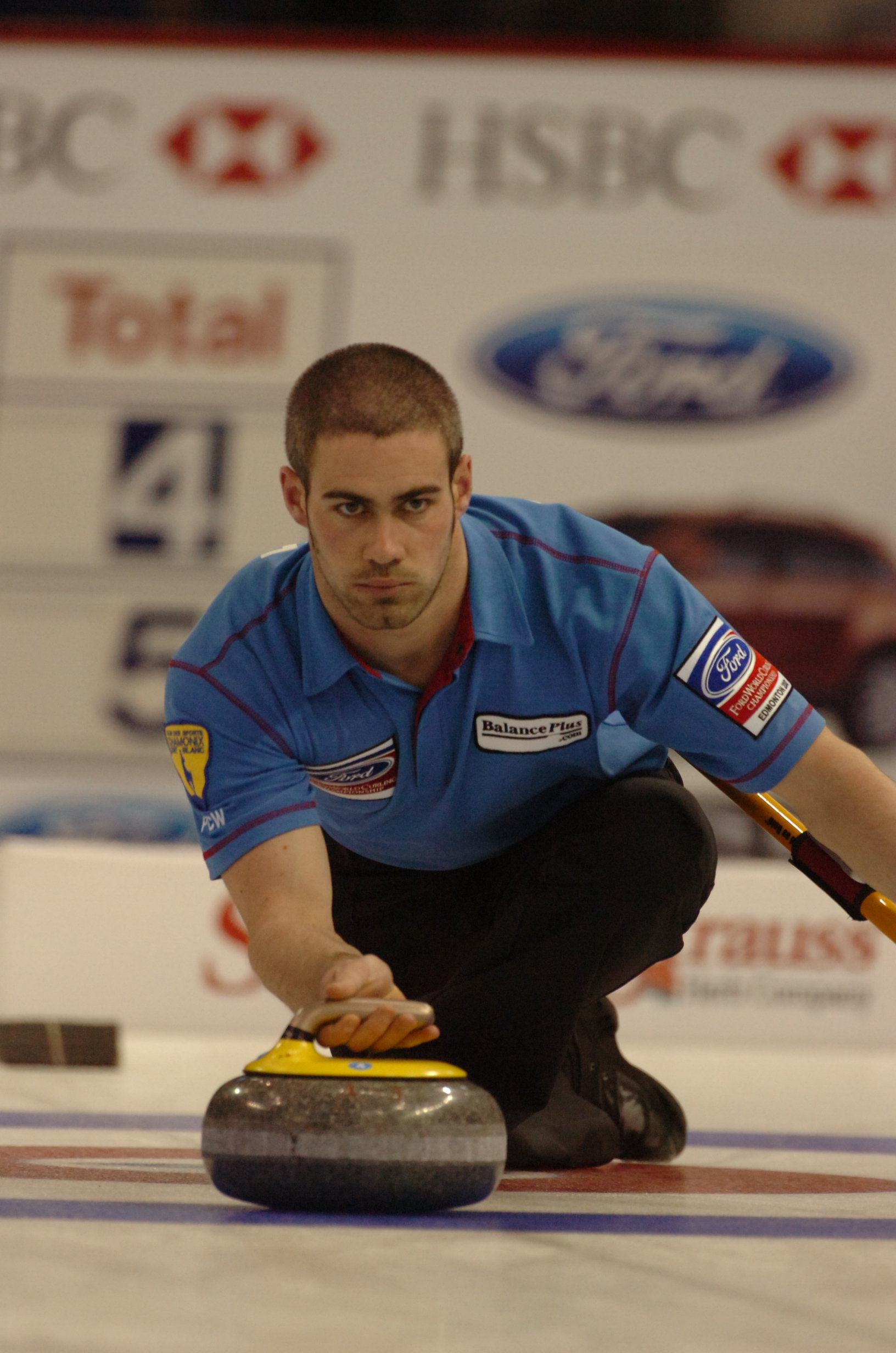 Raphael Mathieu participant aux Jeux Olympiques d'hivers de Vancouver à Edmonton.